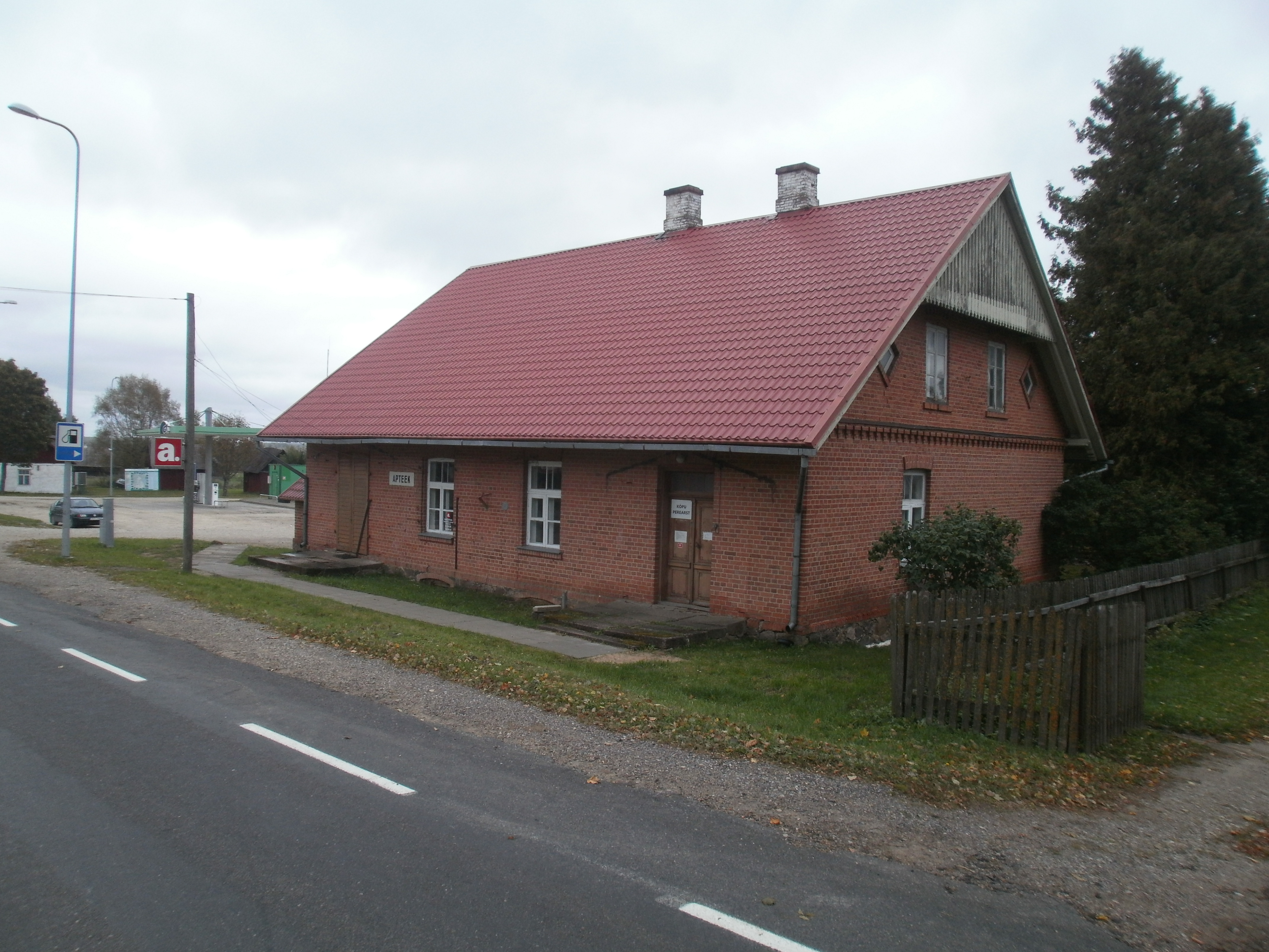 Vaade apteegile kiriku poolt tulles.